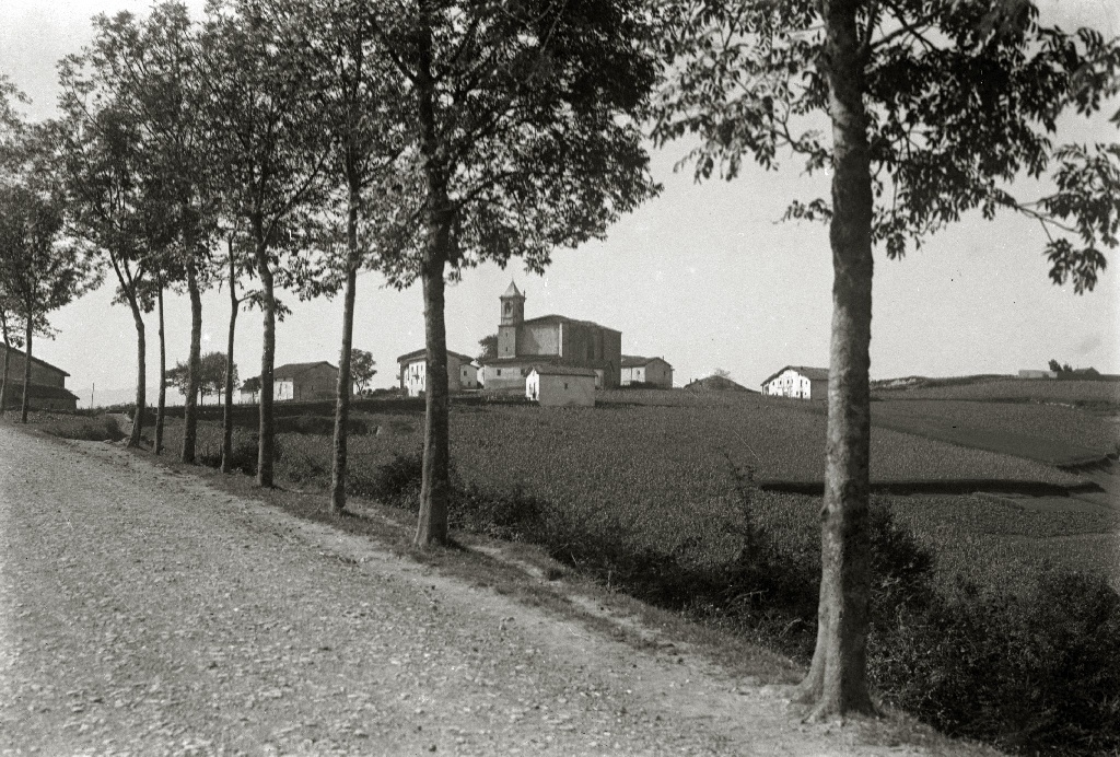 Título original: Vista de las primeras casas de la localidad de Orendain (1/1) Localización: Orendain (Guipúzcoa)